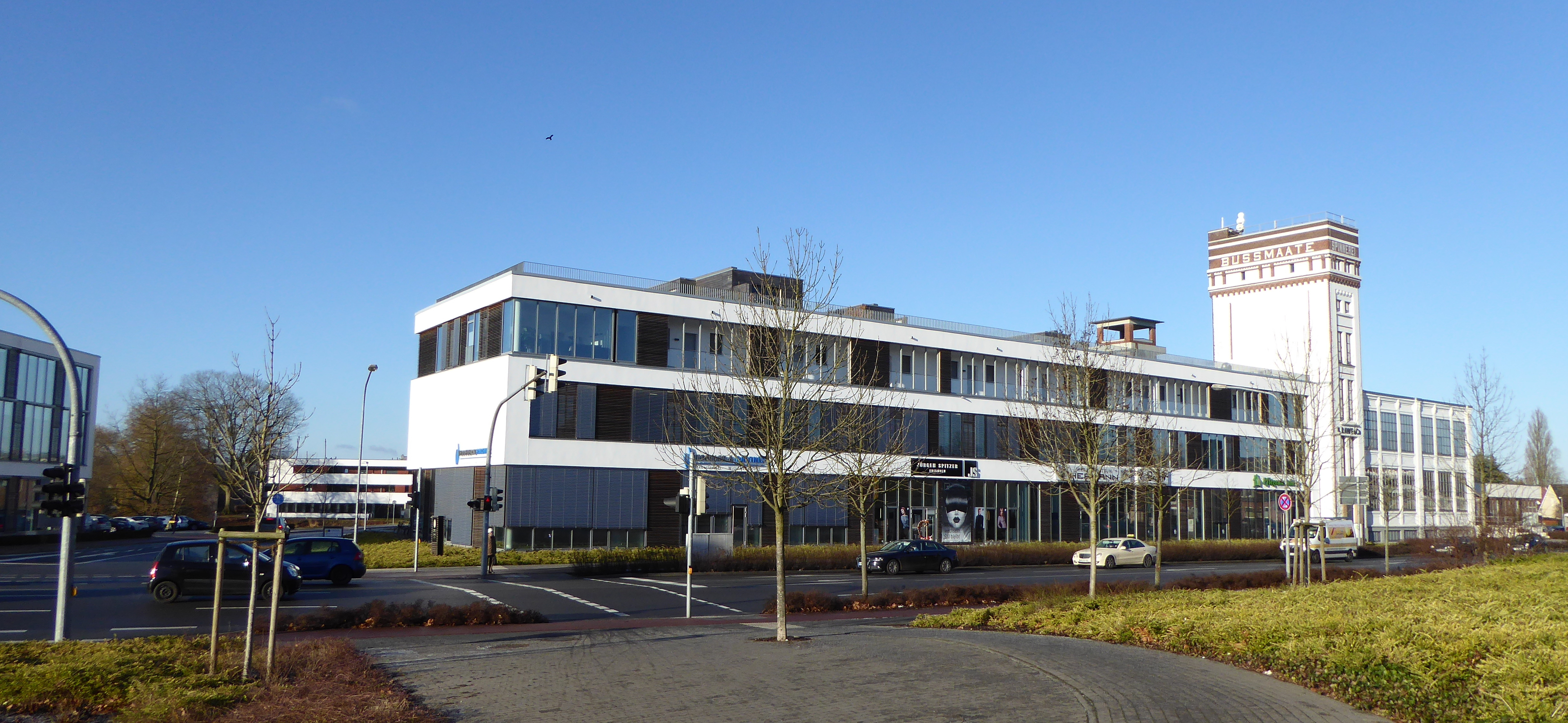 Neunutzung der ehemaligen Fabrikgebäude